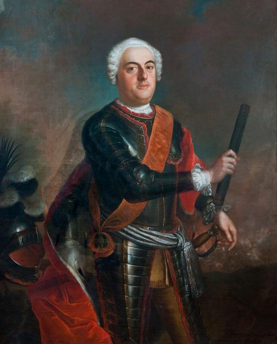 Kniebildnis des Fürsten Dietrich von Anhalt-Dessau (1702-1769) in Paraderüstung. Über dem Harnisch trägt er das orangene Ordensband des preußischen Schwarzen-Adler-Ordens, der ihm 1740 verliehen wurde